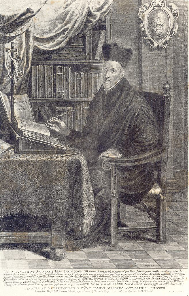 Ancienne gravure du père Leonardus Lessius, jésuite belge du XVIe siècle